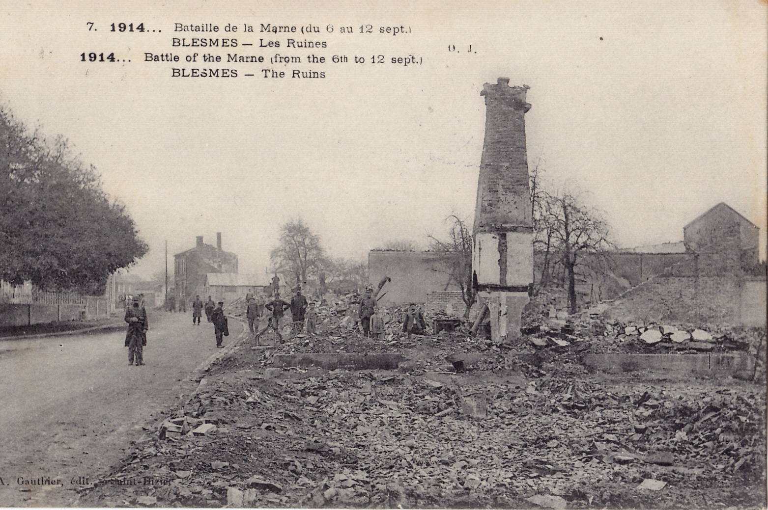 Carte postale ancienne éditée par A. Gauthier à Saint-Dizier, n°7 : 1914... Bataille de la Marne ( du 6 au 12 septembre) - BLESMES - Les ruines